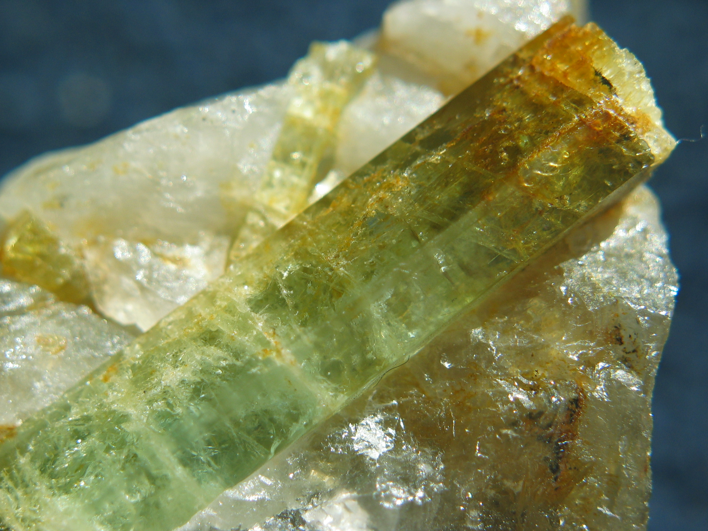 Akwamaryn w kwarcu - Fidirahana, Centralny Madagaskar 1